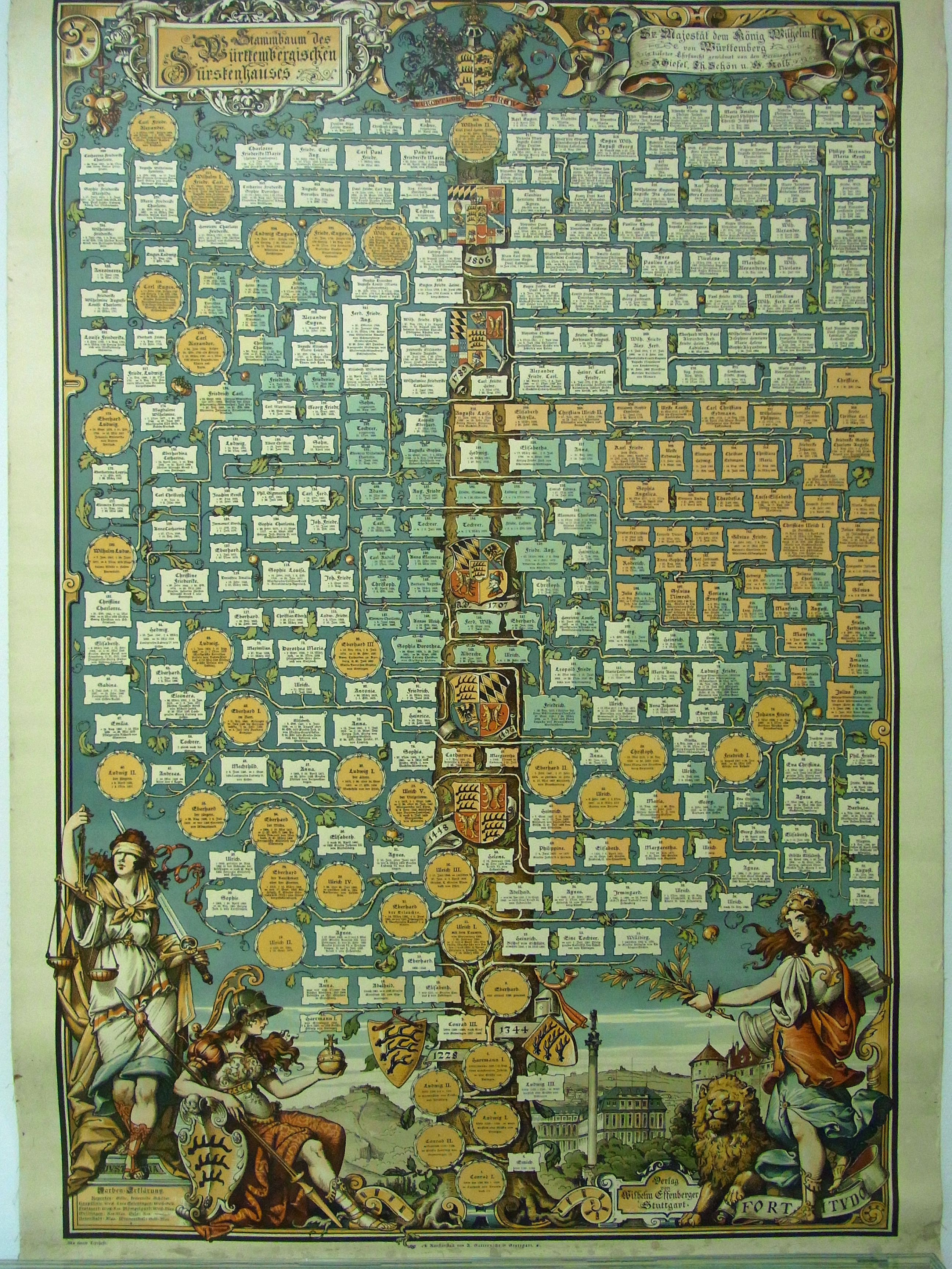 Hechingen: Hohenzollerisches Landesmuseum Genealogie des Hauses Württemberg